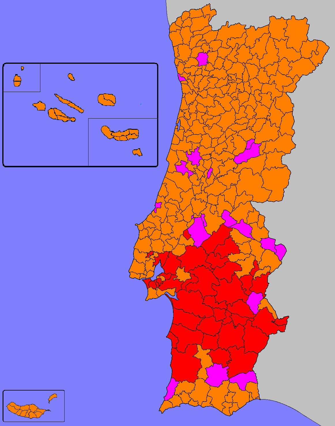 Mapa ilustrativo do partido mais votado por Concelho